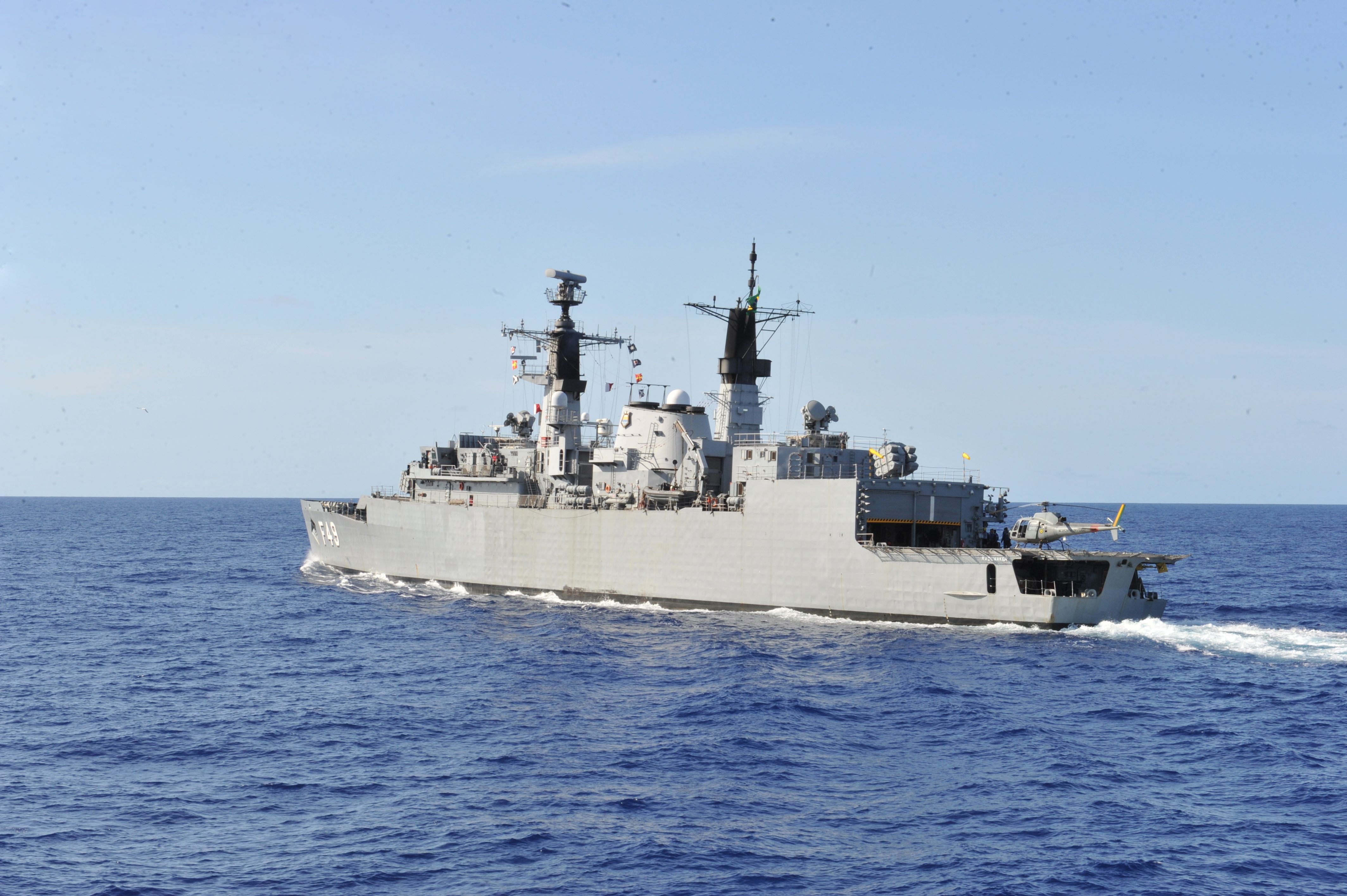 Arquivo liberado pela Marinha do Brasil através de projeto GLAM com Wiki Educação Brasil